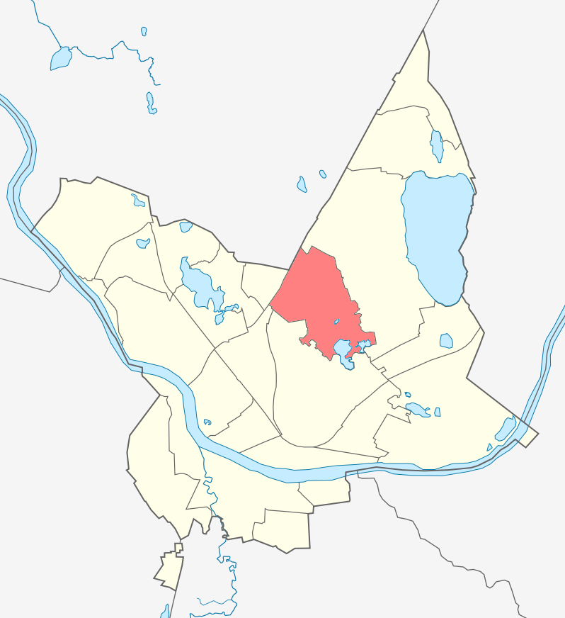 Микрорайон Химия (Даугавпилс) карте Даугавпилса.